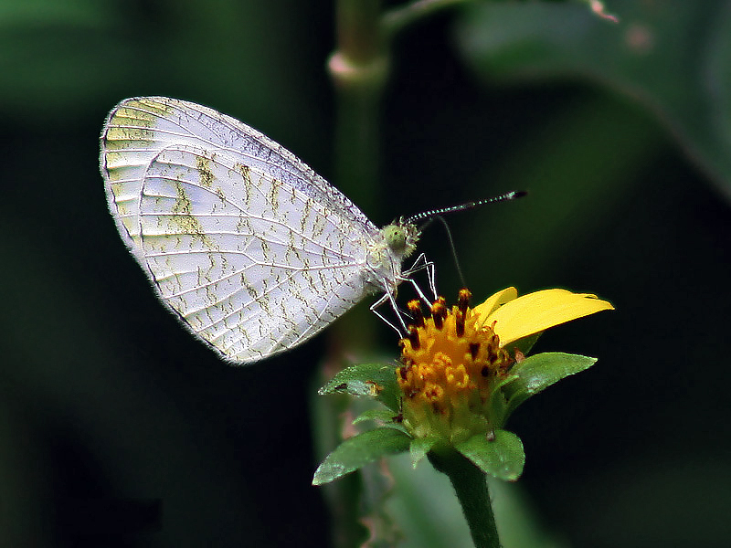 Psyche Leptosia nina in Kolkata, West Bengal, India.